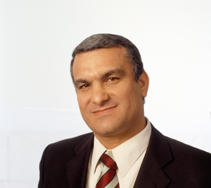 פינחס חליווה - מייסד ומנכ"ל המכללה האקדמית אשקלון